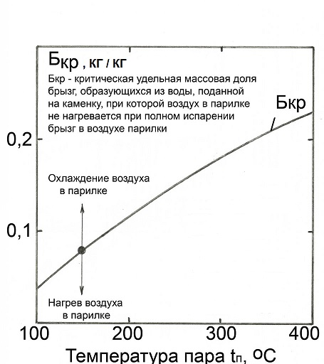 Брызго-паровая диаграмма